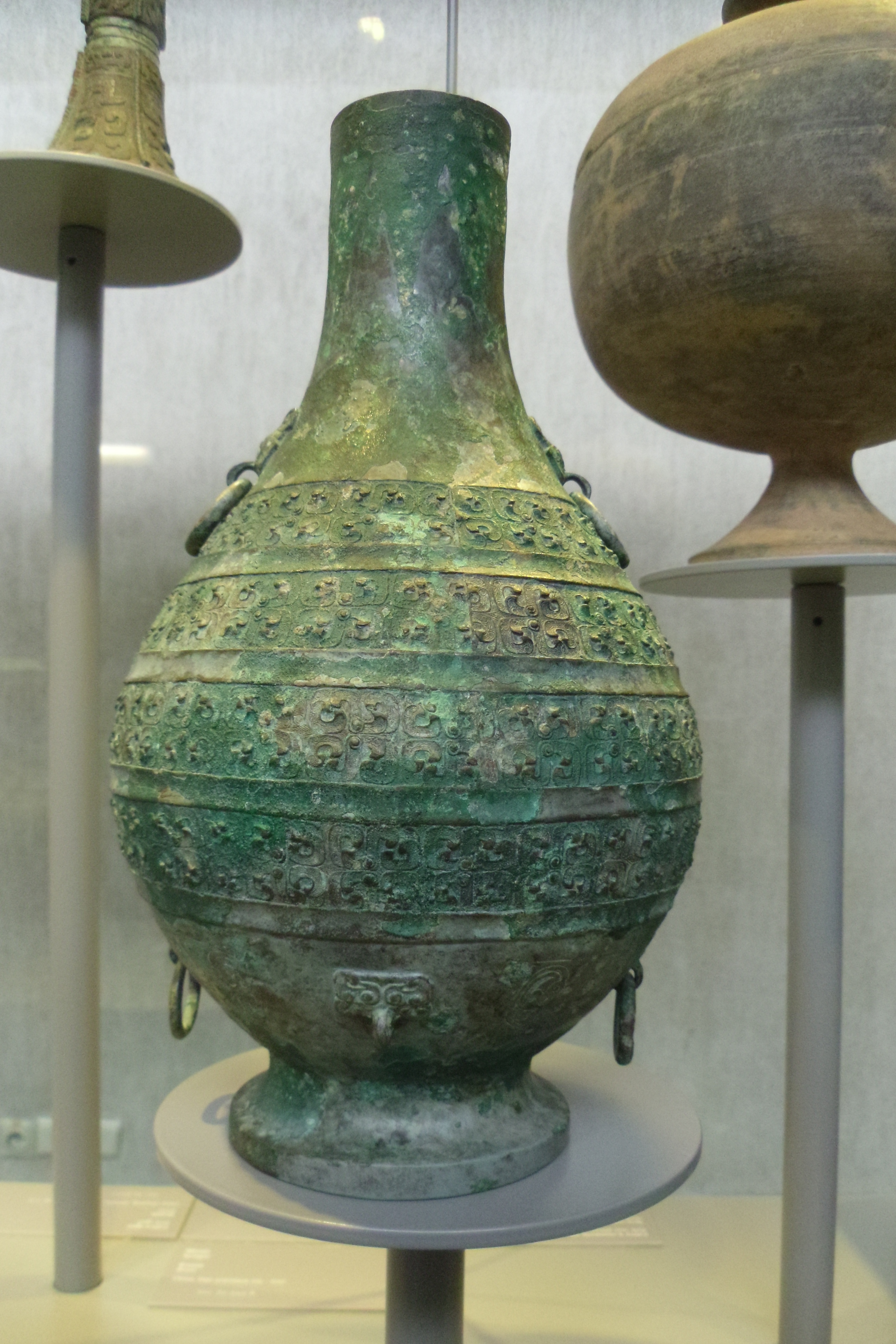 Bouteille (hu) en bronze. Chine, royaumes combattants, IIIe s. av. J.-C. This is a file created at the museum: Musée royal de Mariemont in Morlanwelz